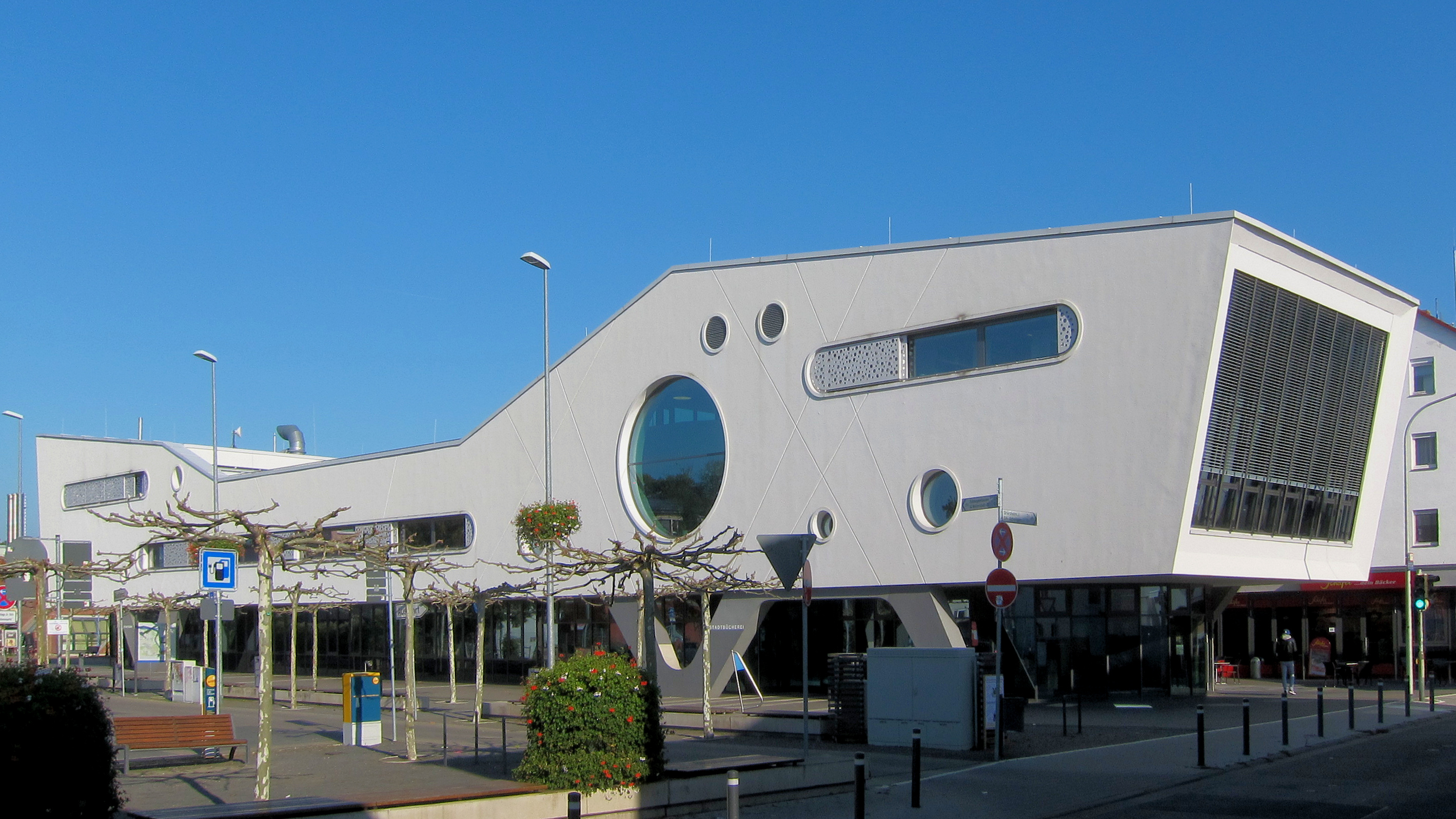 "Medienschiff" Weiterstadt mit Bücherei und Stadtbüro